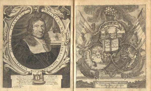 Bildnis Johann von der Behr und Titleblatt seines Werkes: Diarium oder Tagebuch einer neunjährigen Reise